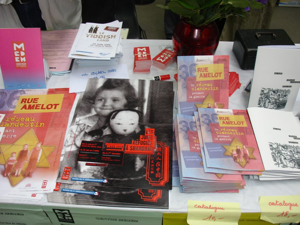 Brochures éditées par le Centre Medem Arbeter Ring Paris